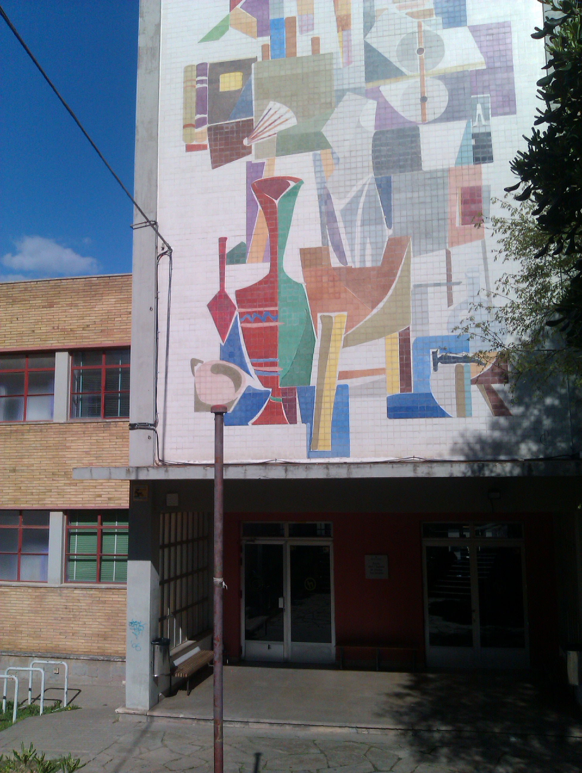 Entrada de l'Escola d'Art Pau Gargallo a Badalona. Abril 2013. Mural de ceràmica de la façana